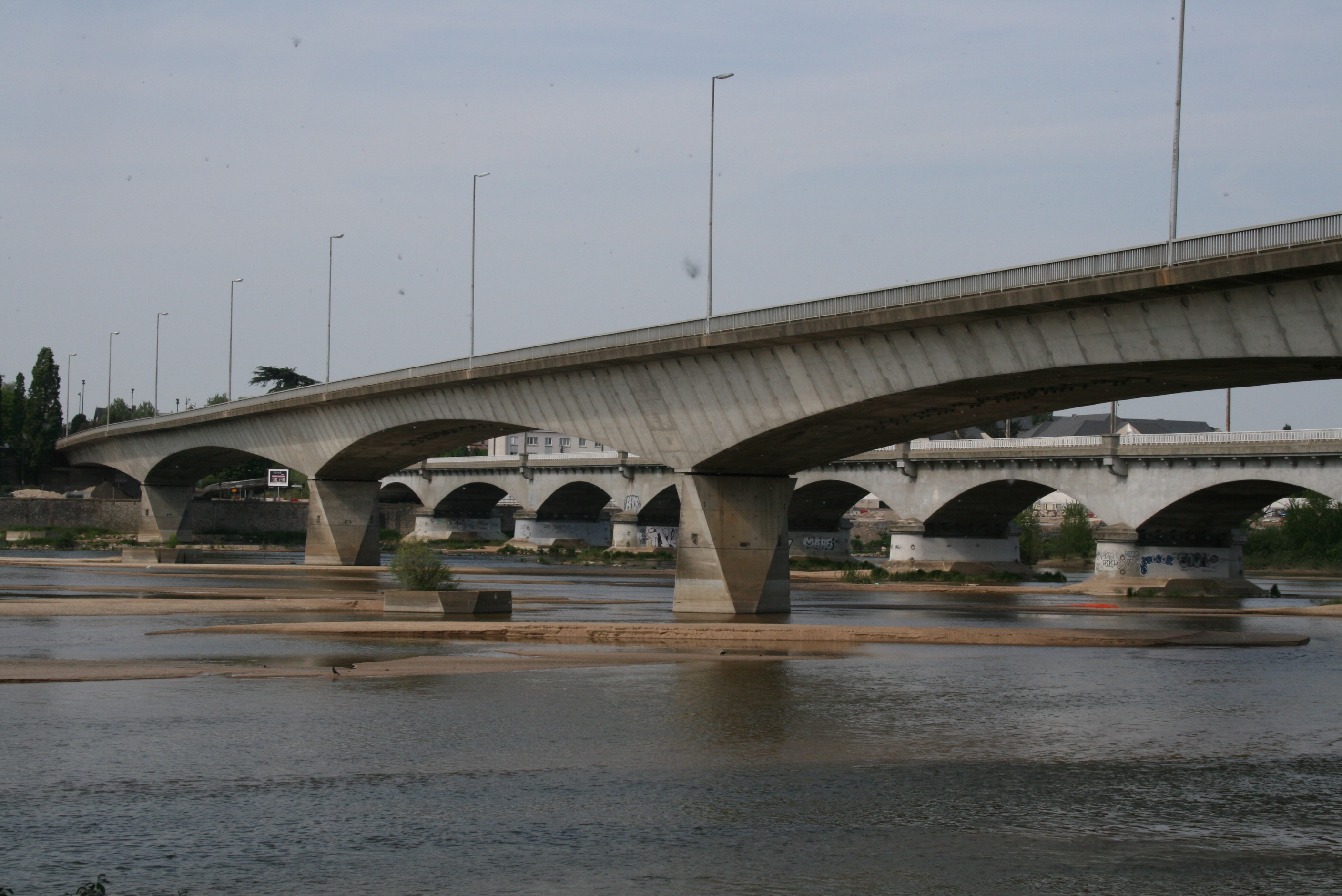 Pont René Thinat – Commune d'Orléans – Département du Loiret – France – Pont en béton précontraint